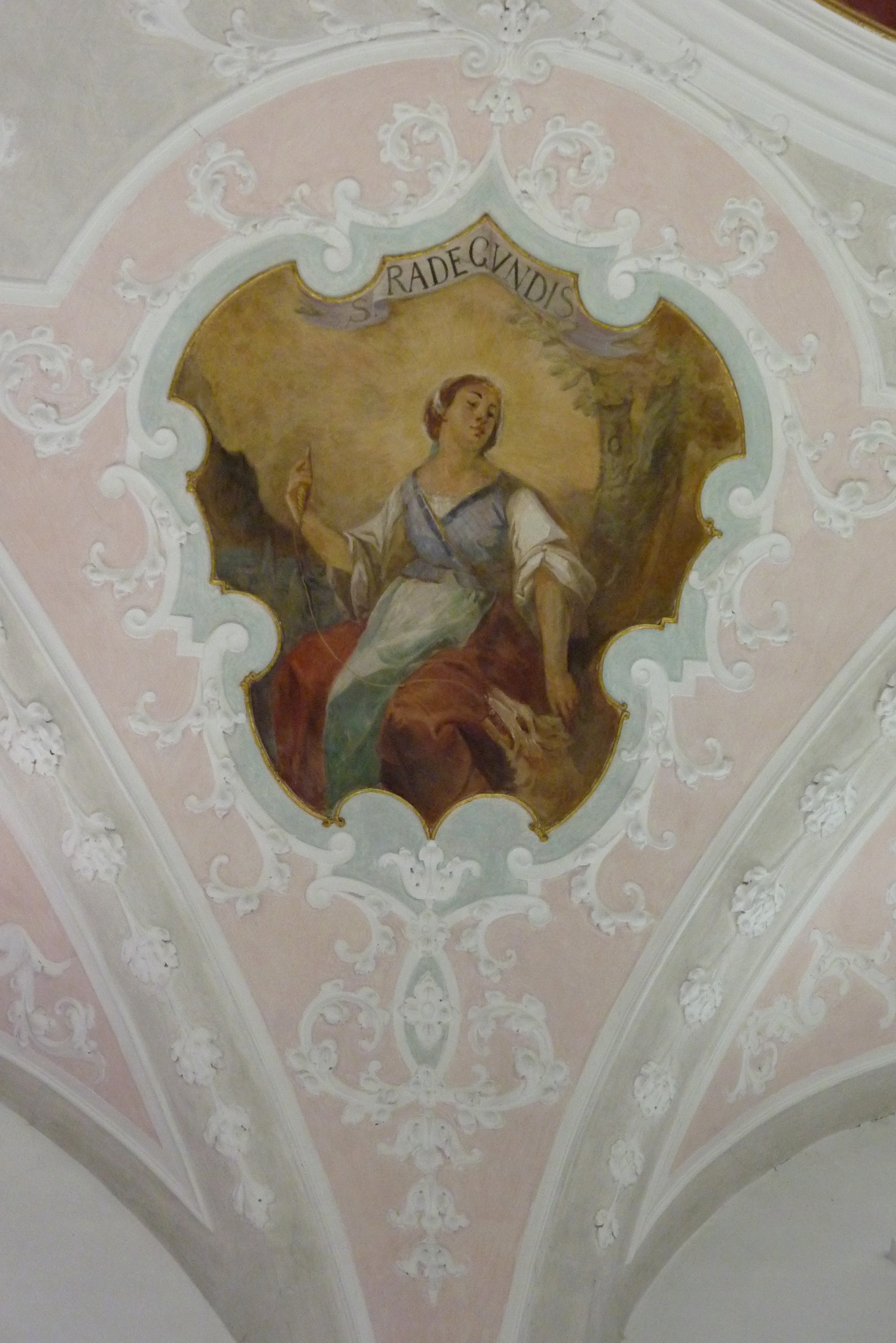 Katholische Pfarrkirche St. Martin in Zusamaltheim, einer Gemeinde im Landkreis Dillingen an der Donau (Bayern), Deckenmalerei, Darstellung: Radegund von Wellenburg